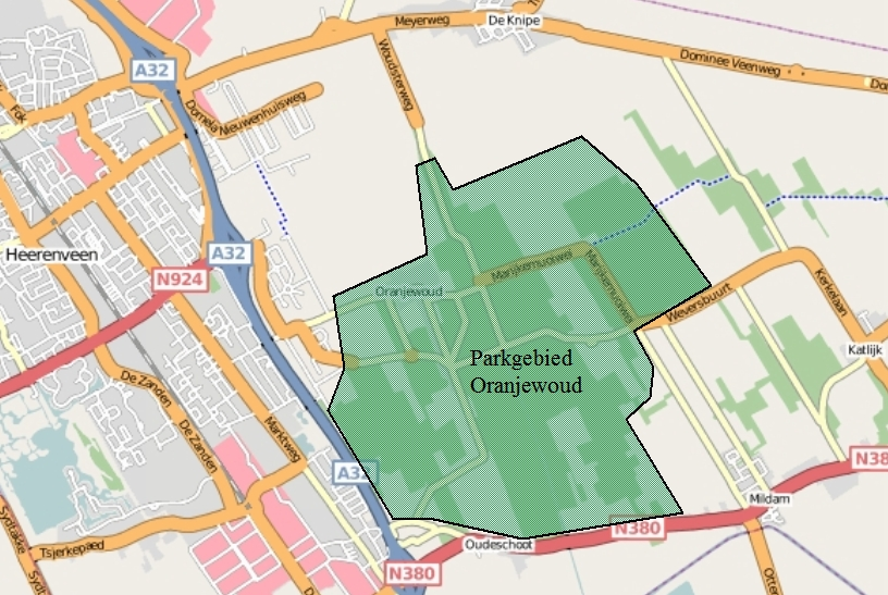 Parkgebied Oranjewoud